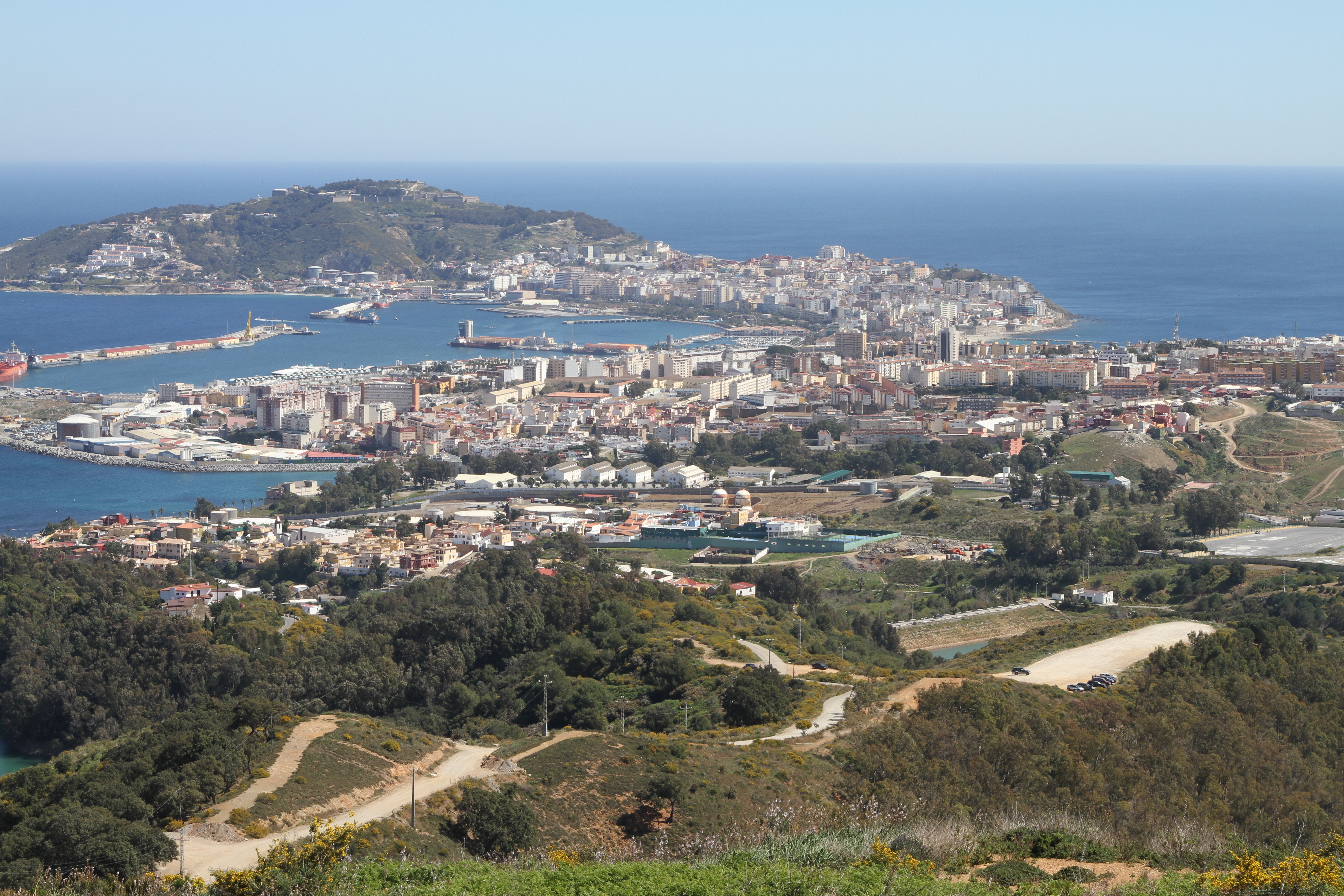 Vista de Ceuta y la península de Almina desde el mirador de Isabel II